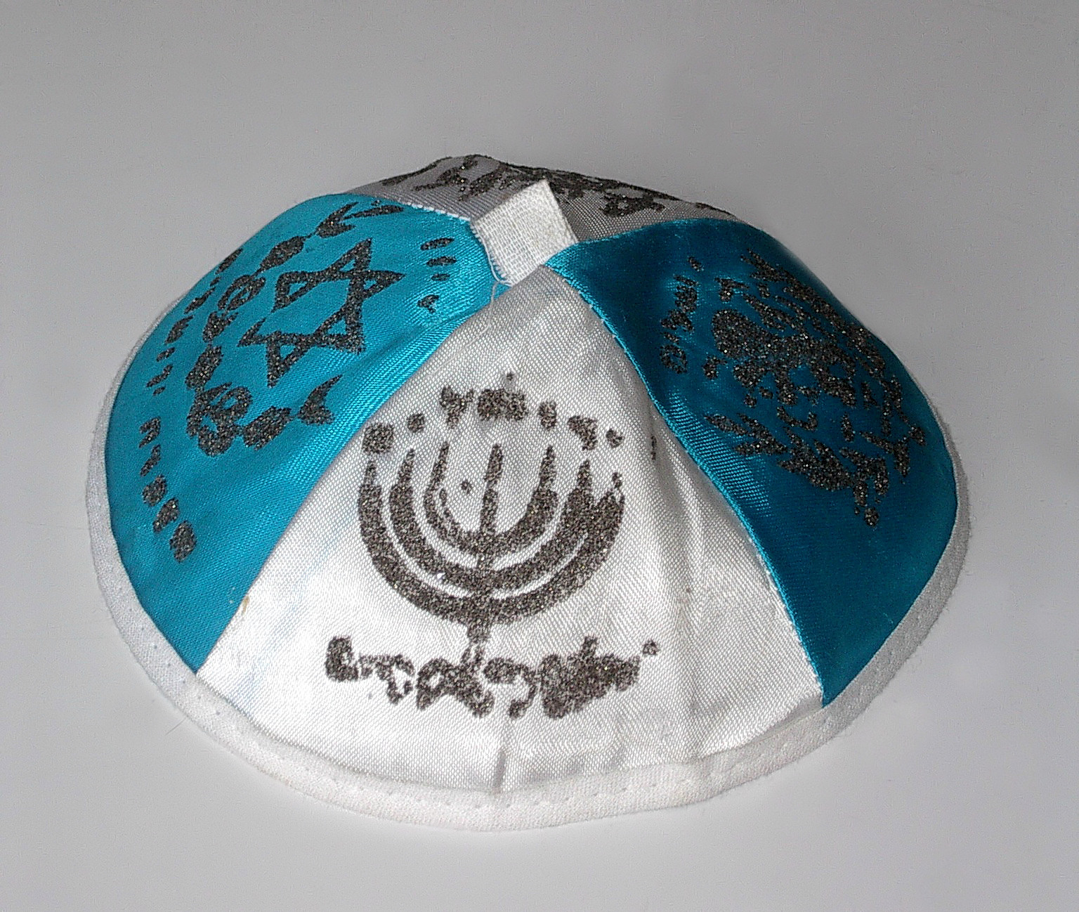 A kippah.